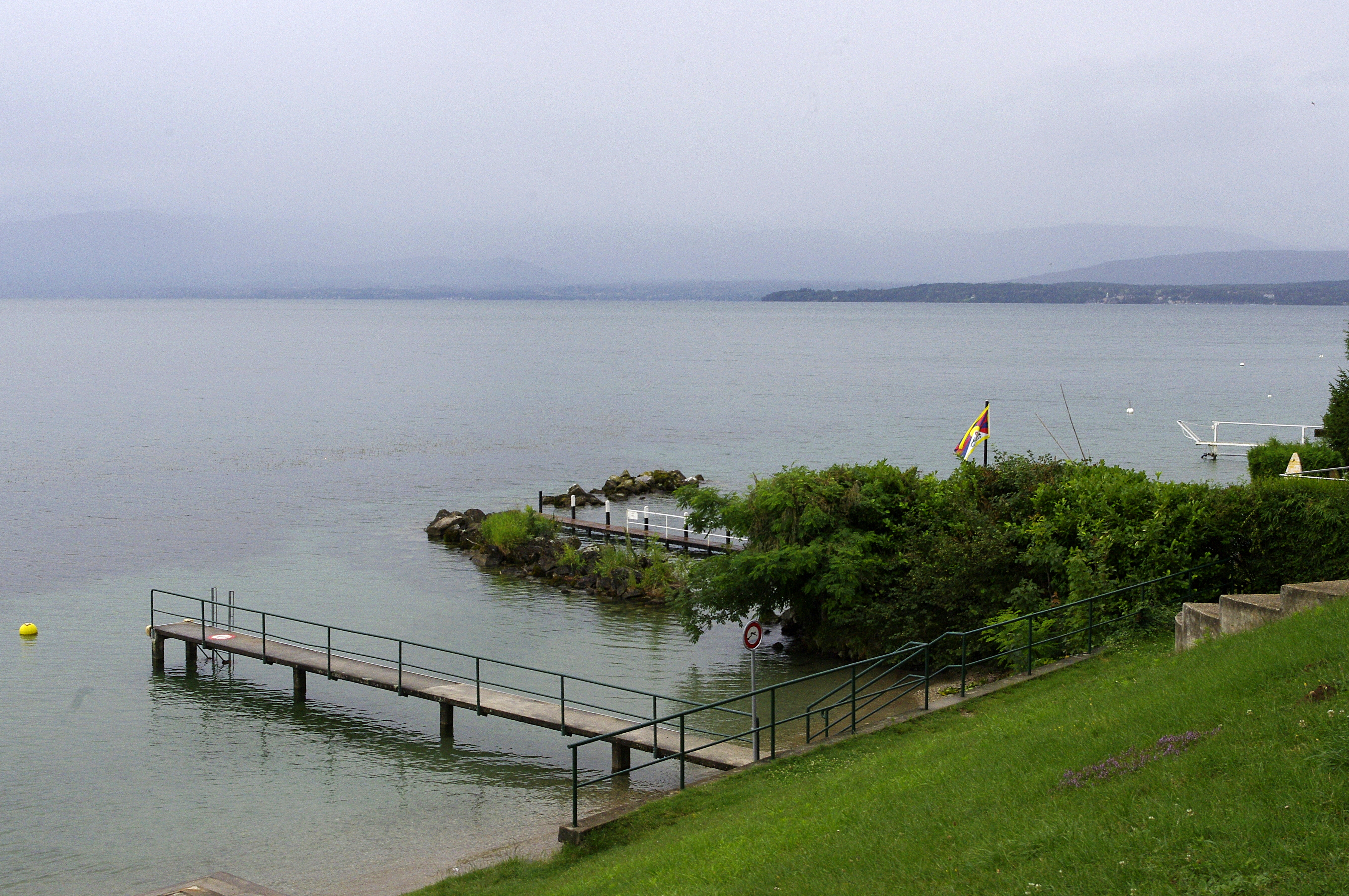 Plage de Gland, Vaud, Suisse